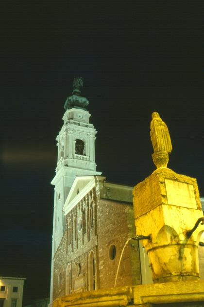 Foto del Duomo di Belluno di notte (sullo sfondo) In primo piano la fontana di piazza del Duomo